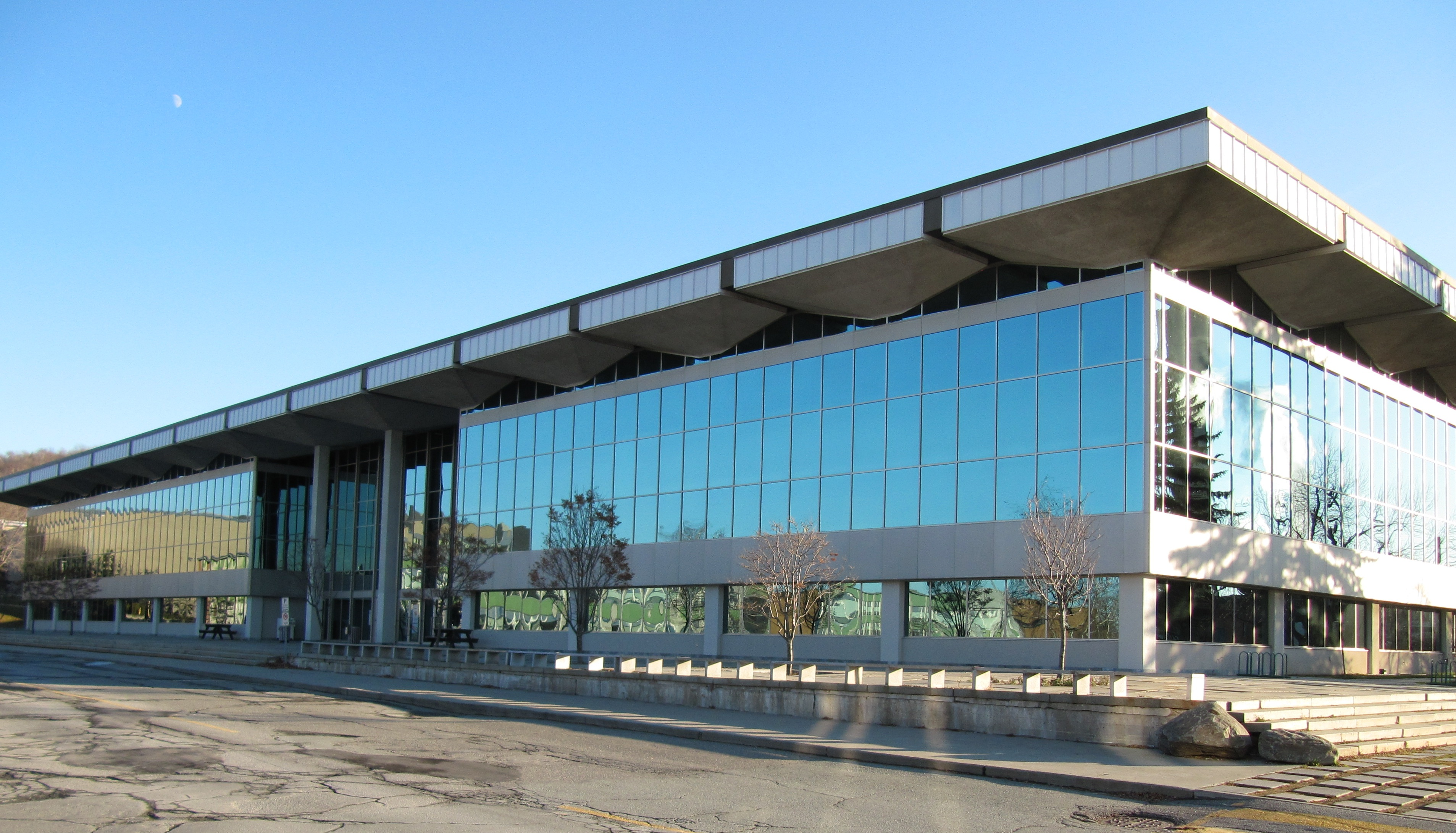 Pavillon Georges-Cabana de l'Université de Sherbrooke. On y retrouve la bibliothèque Roger-Maltais et le Carrefour de l'information.